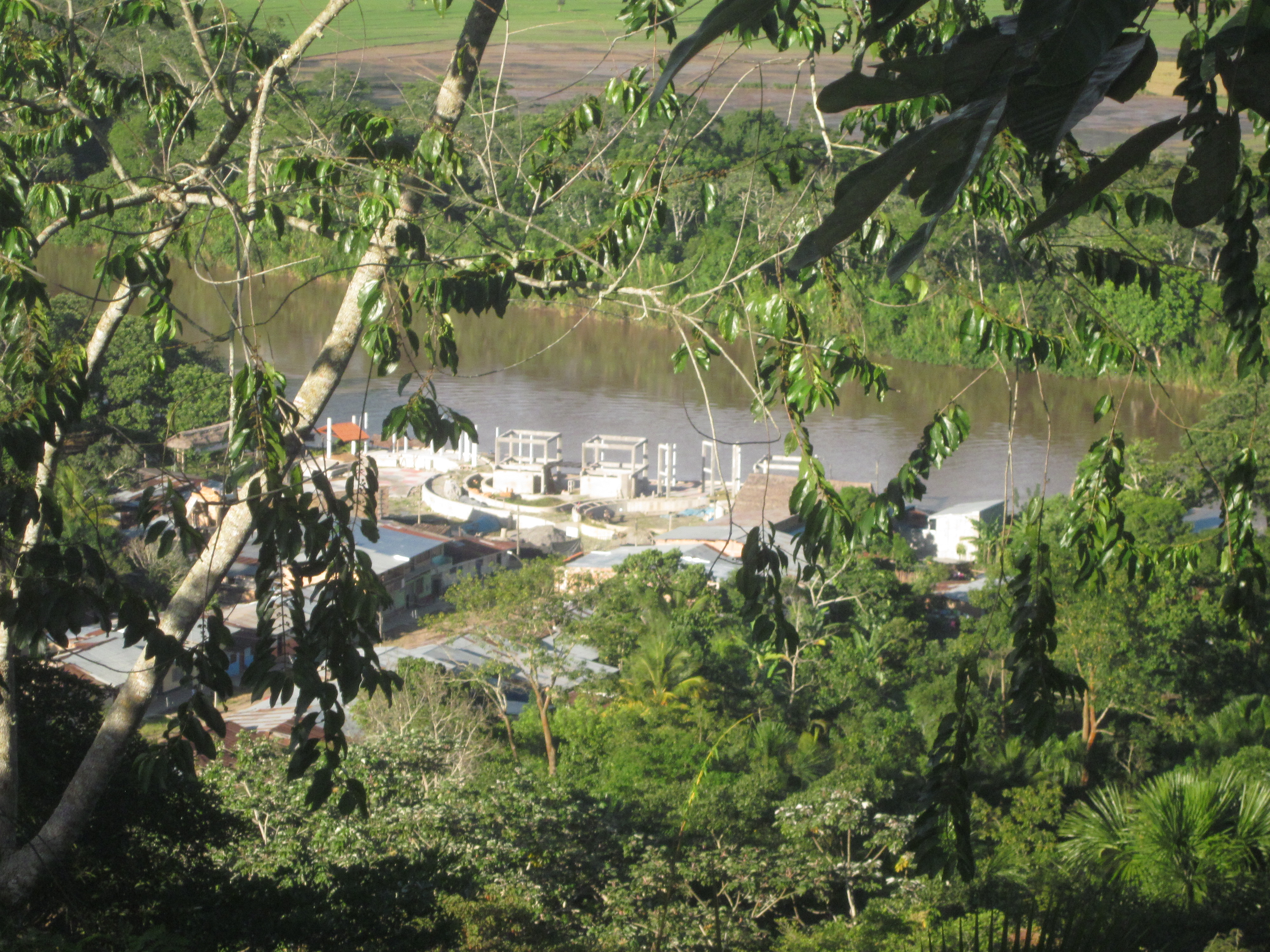 Puerto en el rio Mayo en Moyobamba